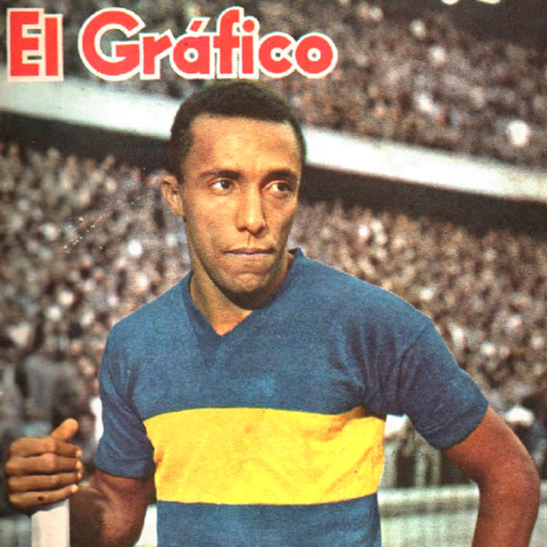 El Grafico del 16 de Agosto de 1961. Edicion 2185